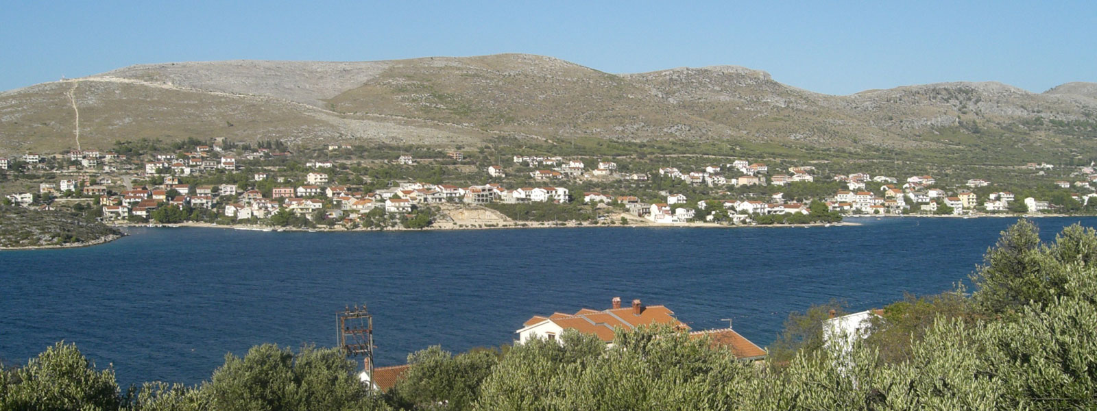 Naselje Grebaštica, kod Primoštena